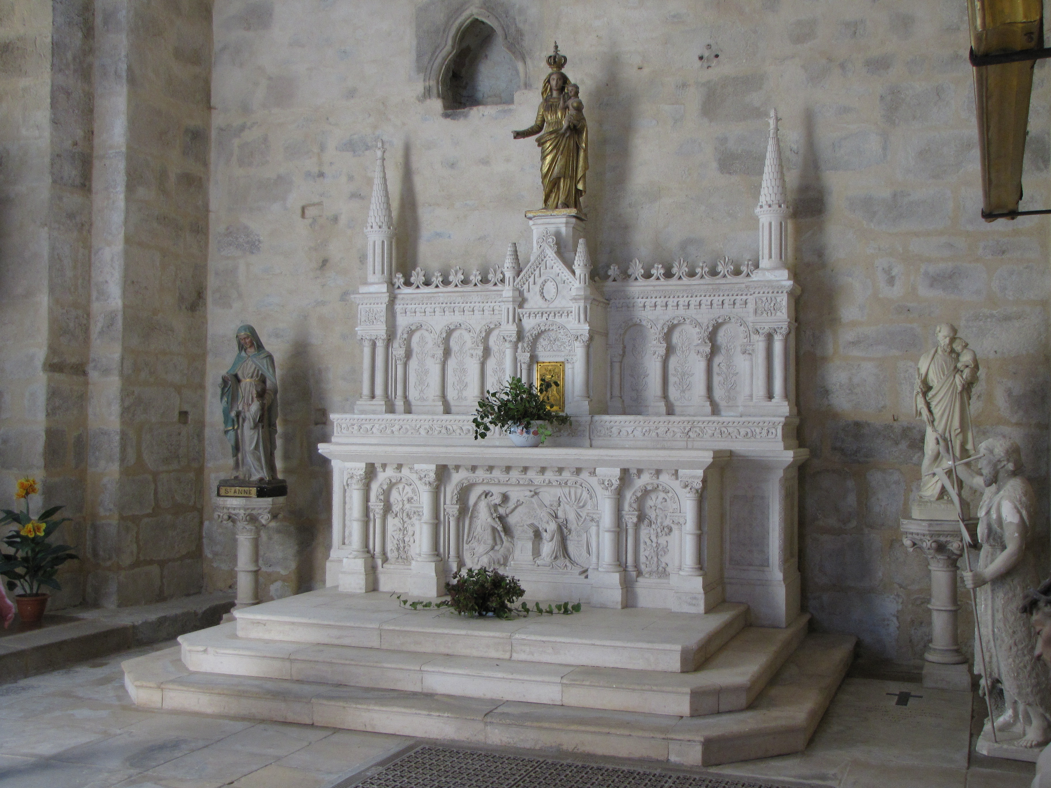 Intérieur de l'église abbatiale Saint-Pierre de Vigeois, Corrèze, France